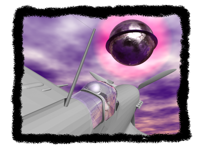 Vue d'artiste de la poursuite d'un ovni par l'avion de Thomas Mantell lors de l'affaire Mantell en 1948.